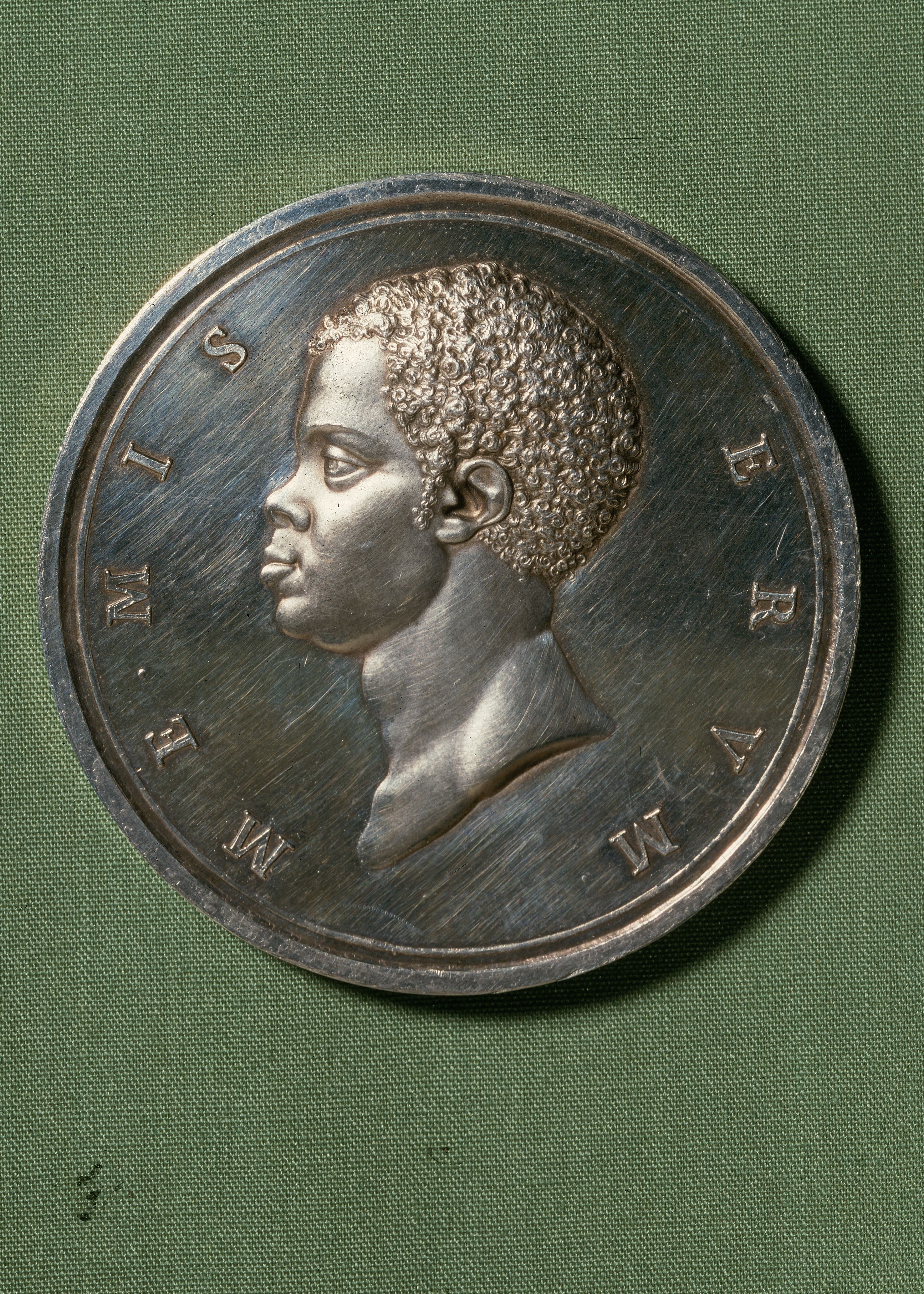 Medalje til minde om forbuddet imod slavehandel fra 1792, fremkommet på privat initiativ. Negerhovedet på bagsiden er tegnet af N. Abildgaard og er et tidligt eksempel på et realistisk afrikansk portræt. Omskriften skal læses "Me miserum" ("Jeg ulykkelige"). Medaljen er et smukt udtryk for den danske liberale reformperiode i 1790'erne.